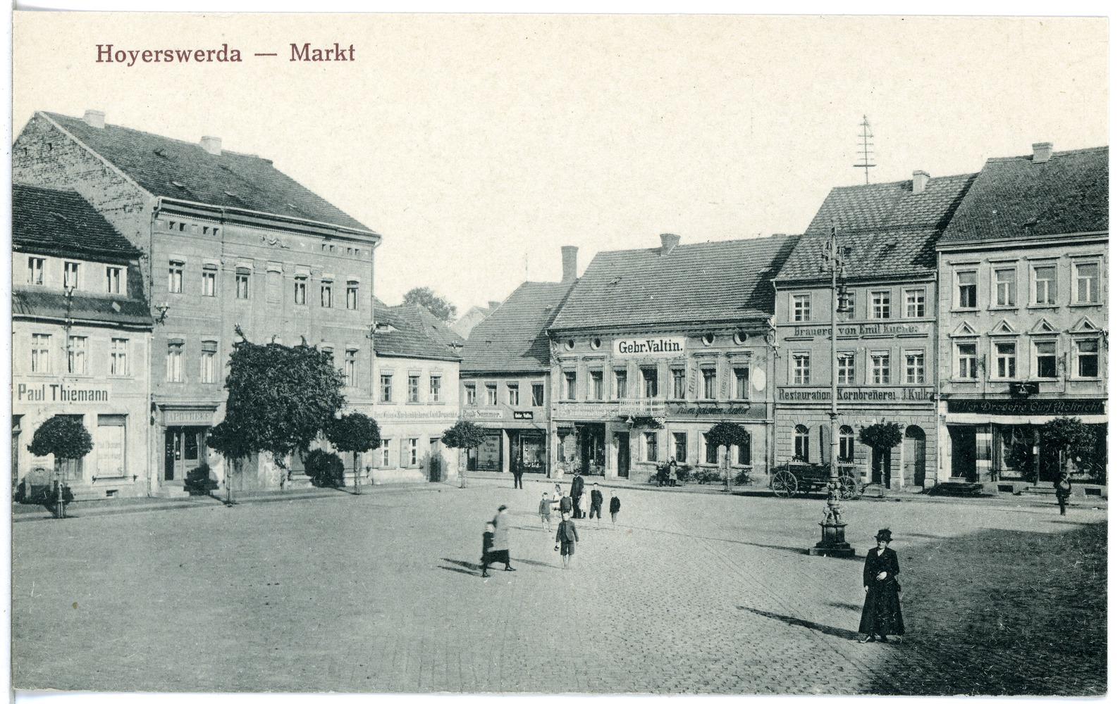 Hoyerswerda; Markt This postcard is from publisher Brück & Sohn in Meißen ( postcard has a unique number 20679 and is available in a higher resolution at the publisher. This images was uploaded in a cooperation project between Wikipedians and the publisher.